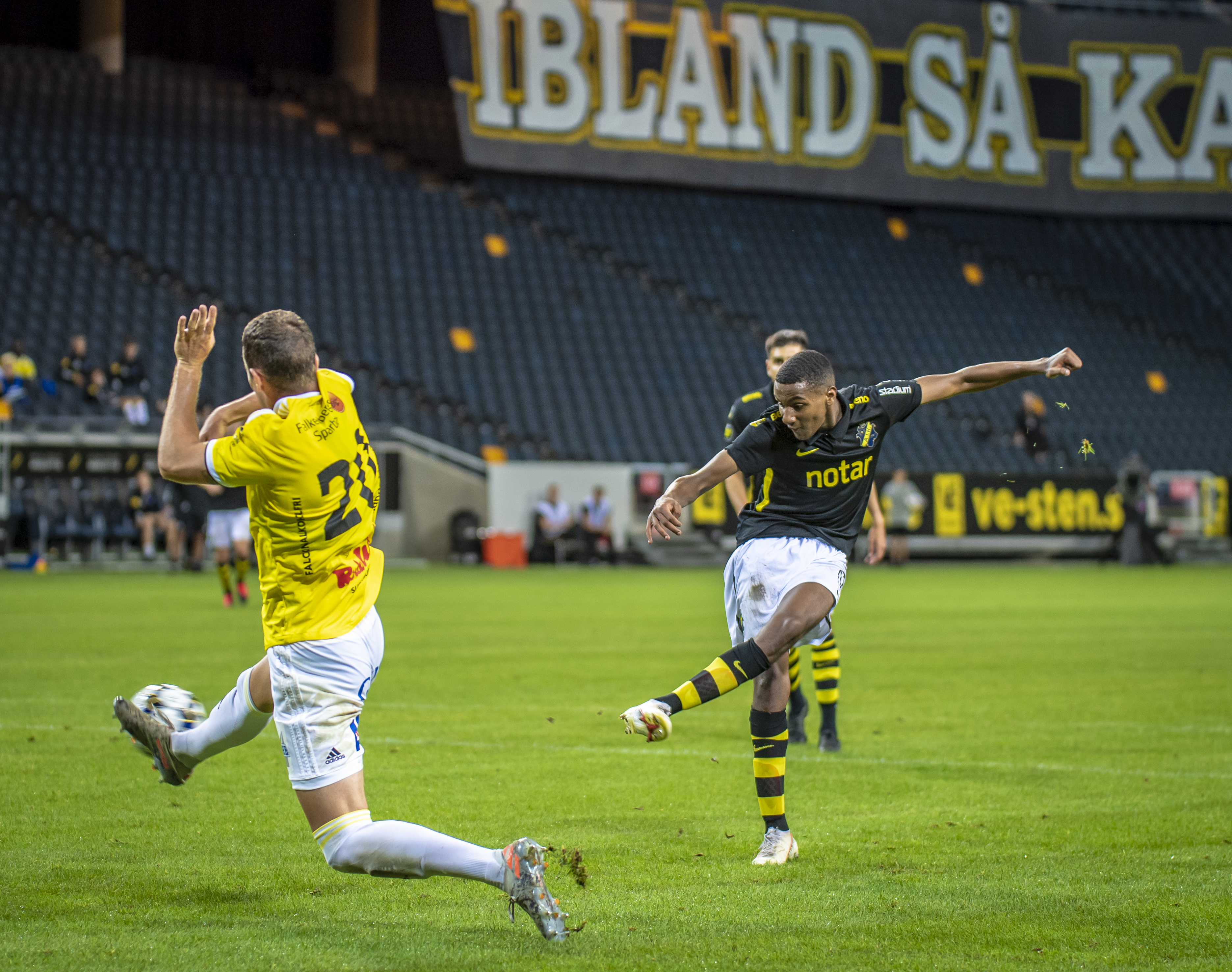 Paulos Abraham den 5 juli 2020. Han gjorde AIK:s mål då man spelade 1-1 mot Falkenberg på Friends Arena